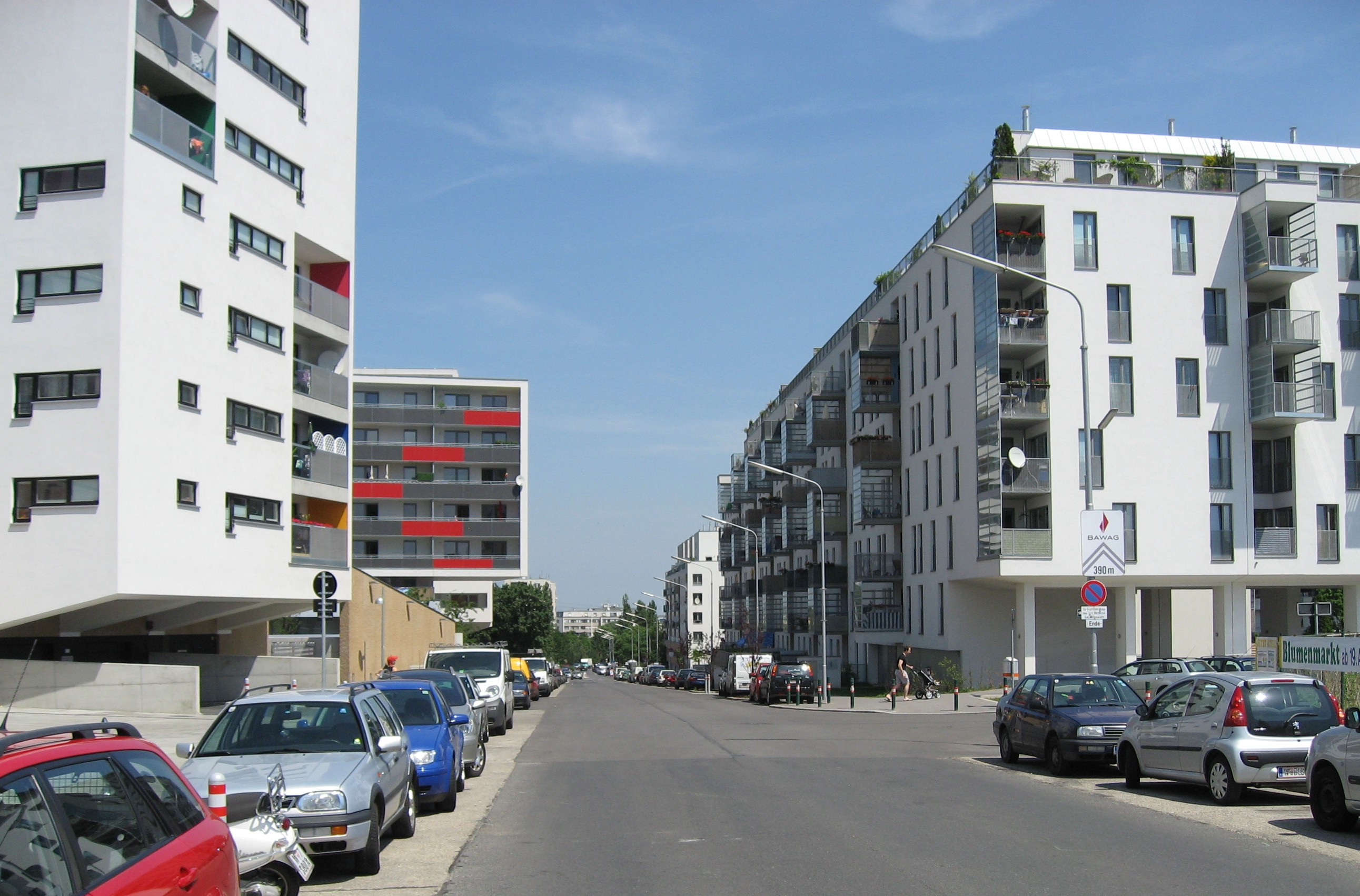 Thürnlhofstraße in Wien, Kaiserebersdorf